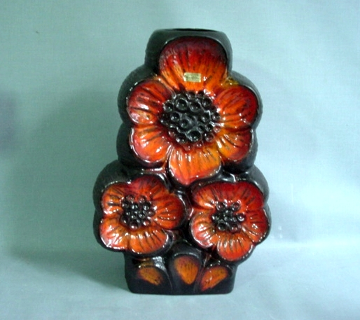 Vase à décor en relief, Manufacture Carstens, Allemagne, XXe siècle